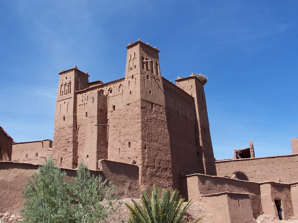 Een kasbah in ksar Aït Ben Haddou, nabij Ouarzazate, Marokko